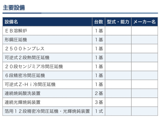 naoe